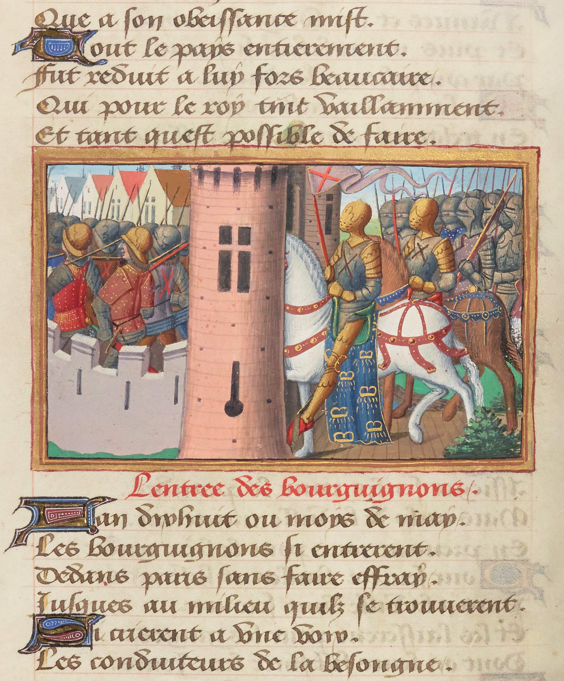 Les Bourguignons entrent dans Paris (1418).